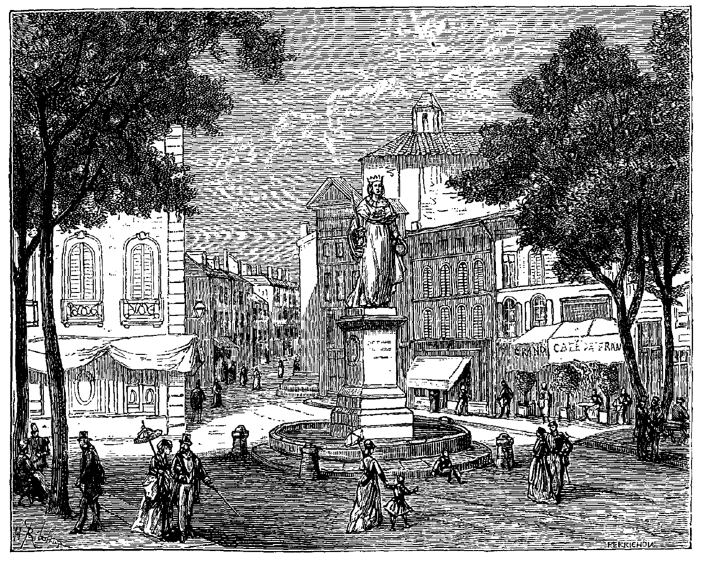 extrait de La France illustrée, géographie, histoire, administration, statistique, etc., tome I, par V.-A. Malte-Brun.